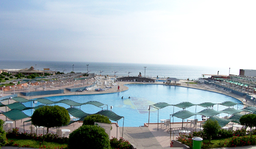 Vista Sede Playa Country Club "El Bosque". Piscina